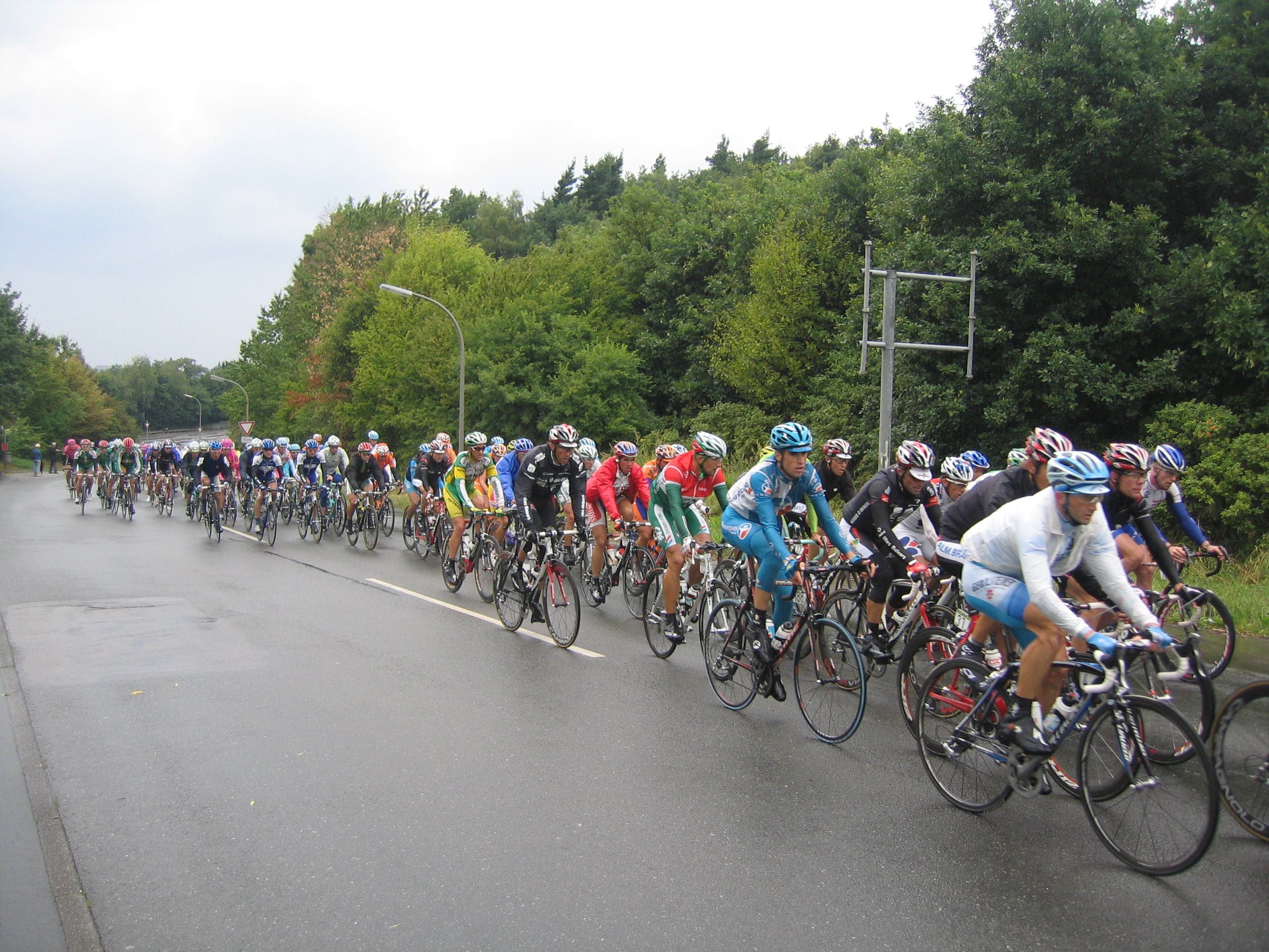 Peloton Deutschlandtour 2006, 1. Etappe